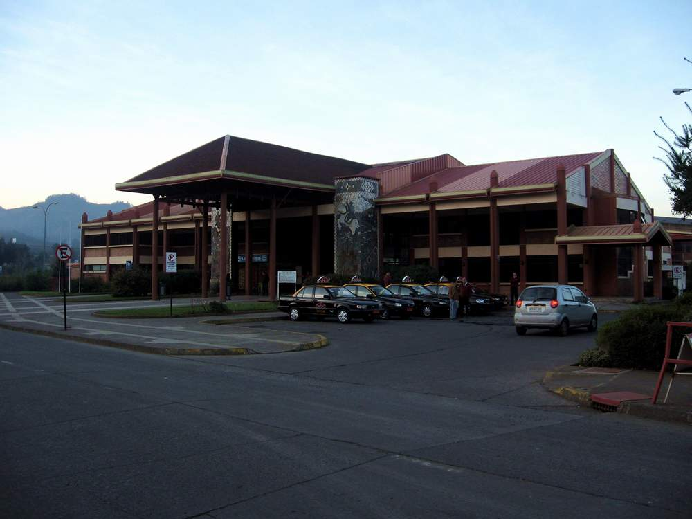 Terminal Rodoviario de La Araucanía, Temuco, Chile.